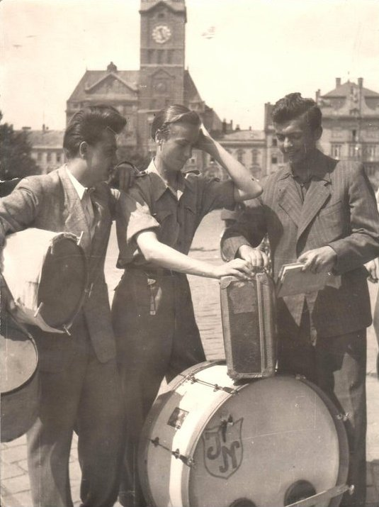 Jaromír Kaňák jako mladý muzikant